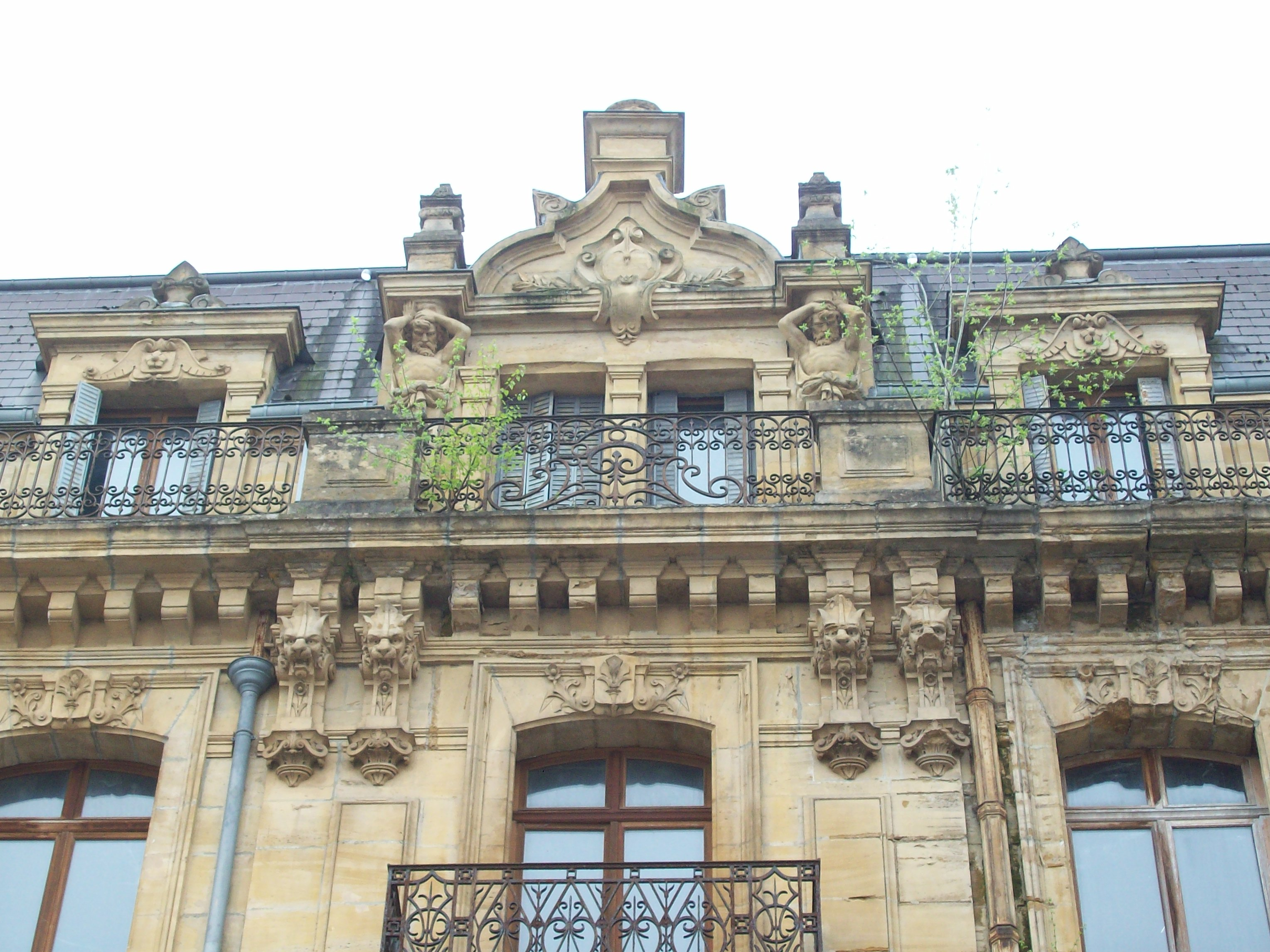 Détails de la façade.